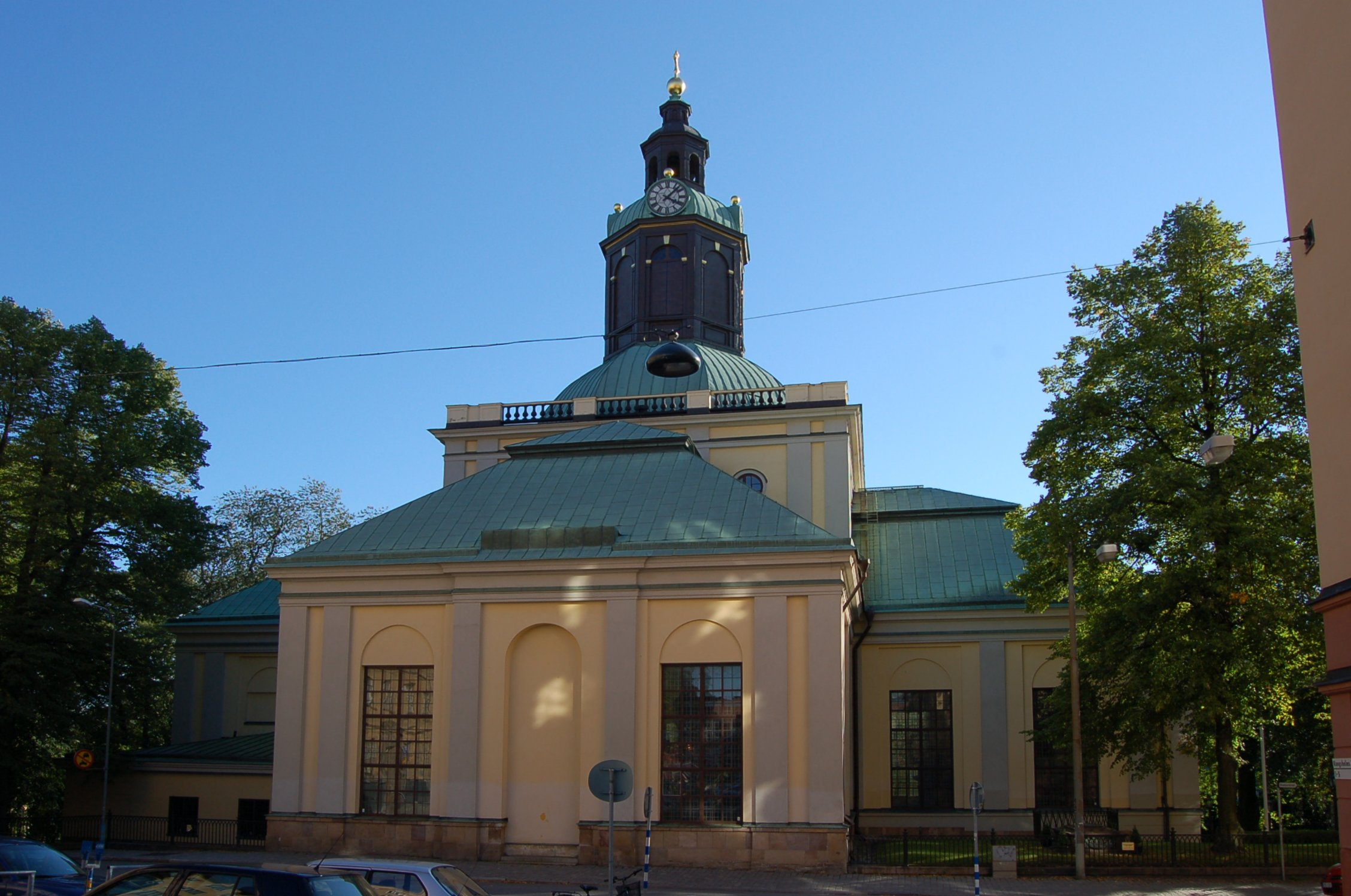 Norrvy av Kungsholms kyrka i Stockholm.